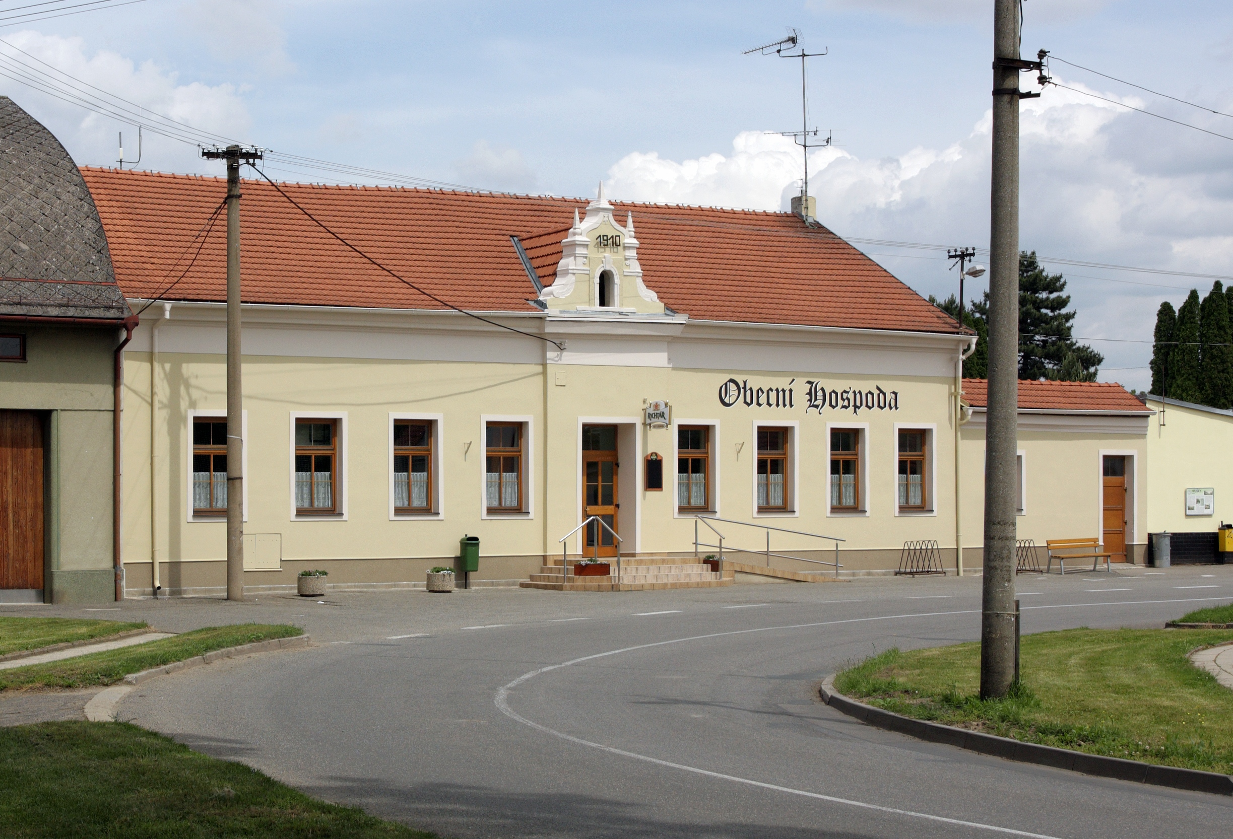 Hrušky (okres Vyškov) - obecní hospoda.